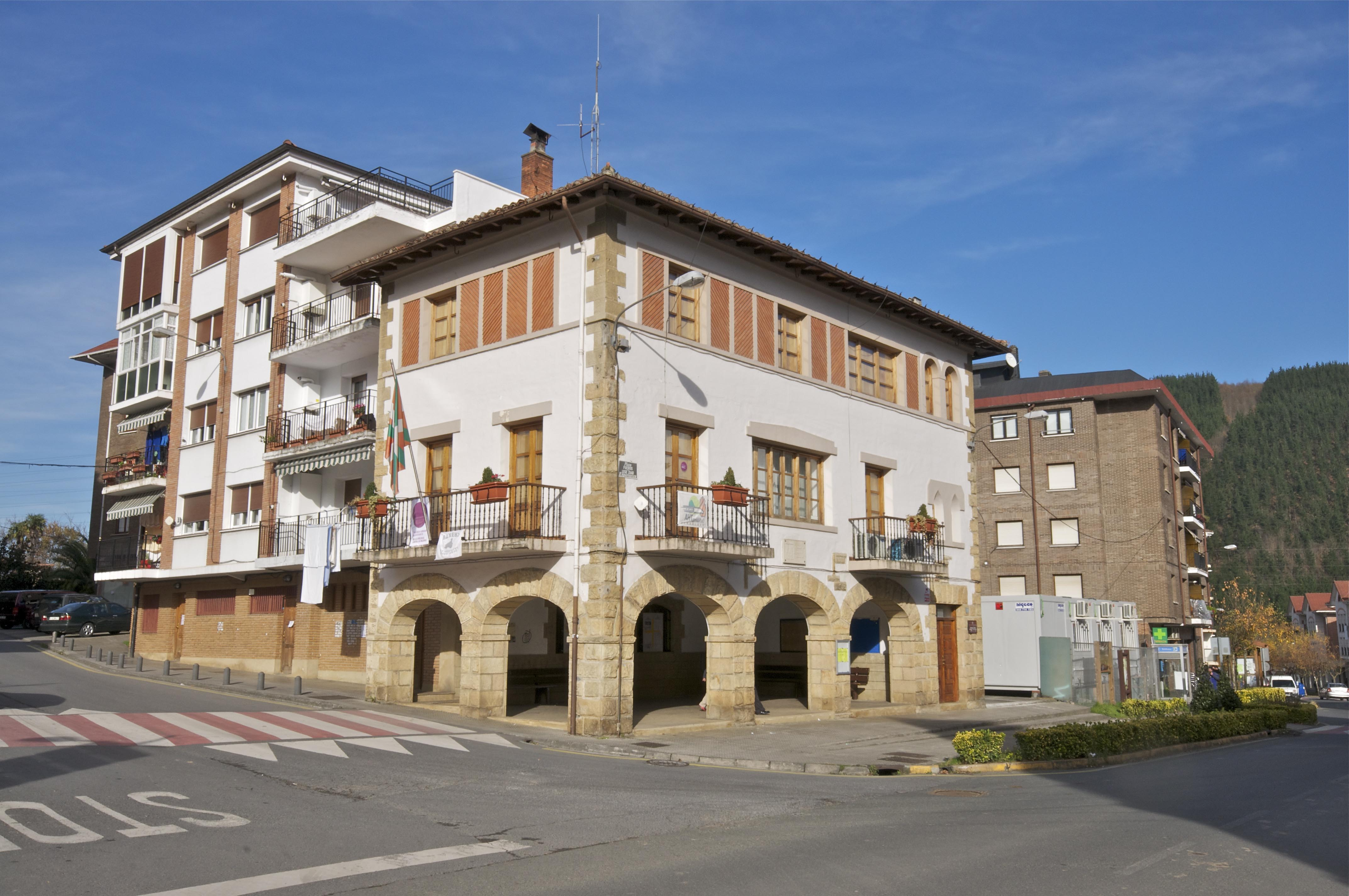 Ayuntamiento Apatamonasterio